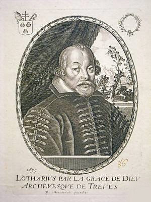 Lothar von Metternich, Erzbischof von Trier 1599–1623, gestochen von Balthasar Moncornet (um 1630-nach 1670), datiert 1659, wohl spätere Auflage, Plattengröße 16 x 11,1 cm.